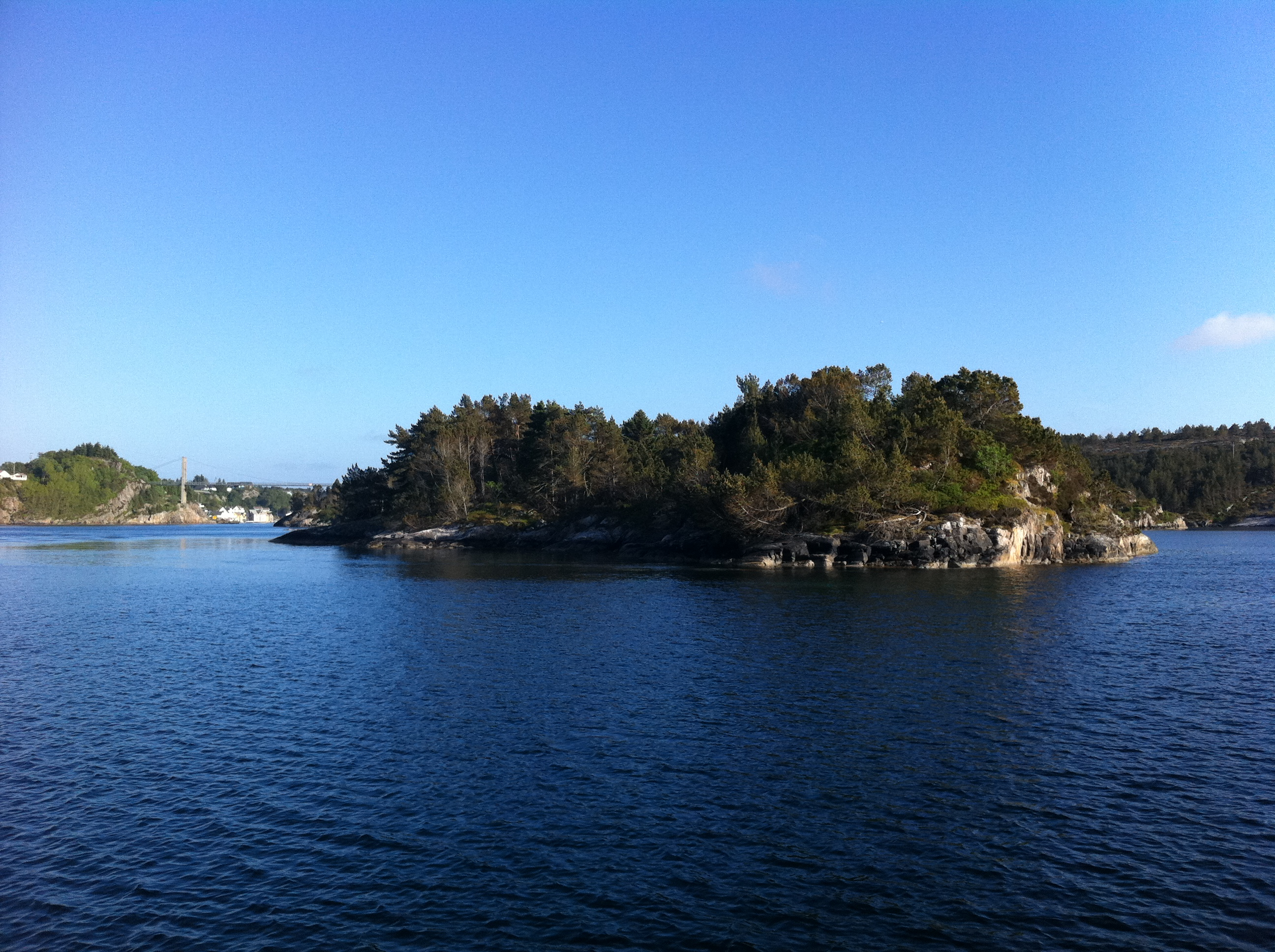 Nordspissen av Tofterøy sett fra sjøen